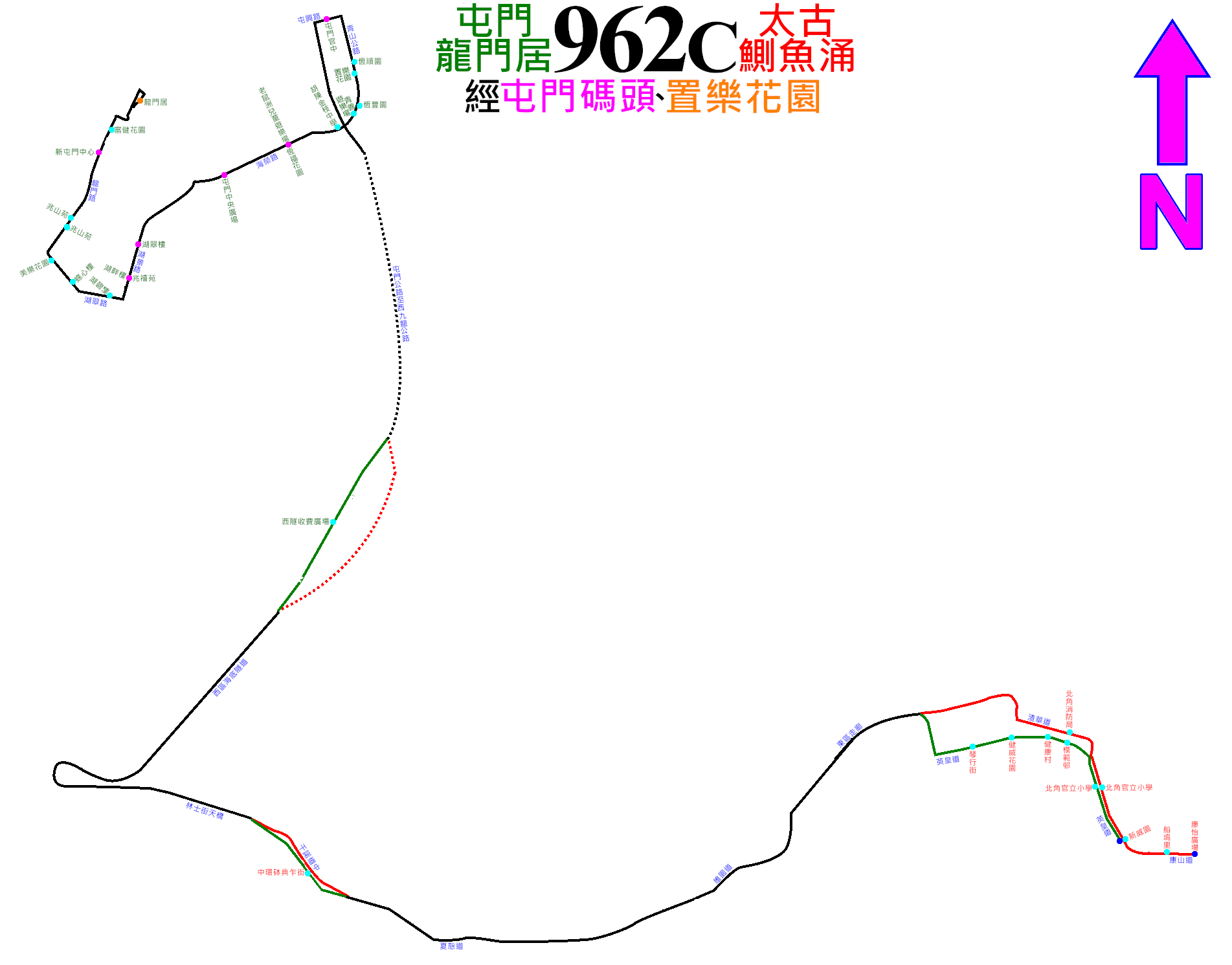 過海隧巴962C線的走線圖